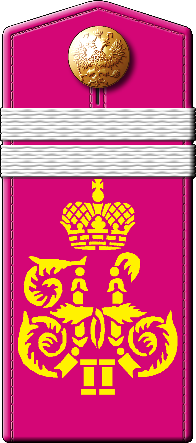 Российская Империя. Российская Императорская армия. 1-й Восточно-Сибирский стрелковый Его Величества полк. Знаки различия по состоянию на 1904-1909 г. Погон воинского звания «Младший унтер-офицер»